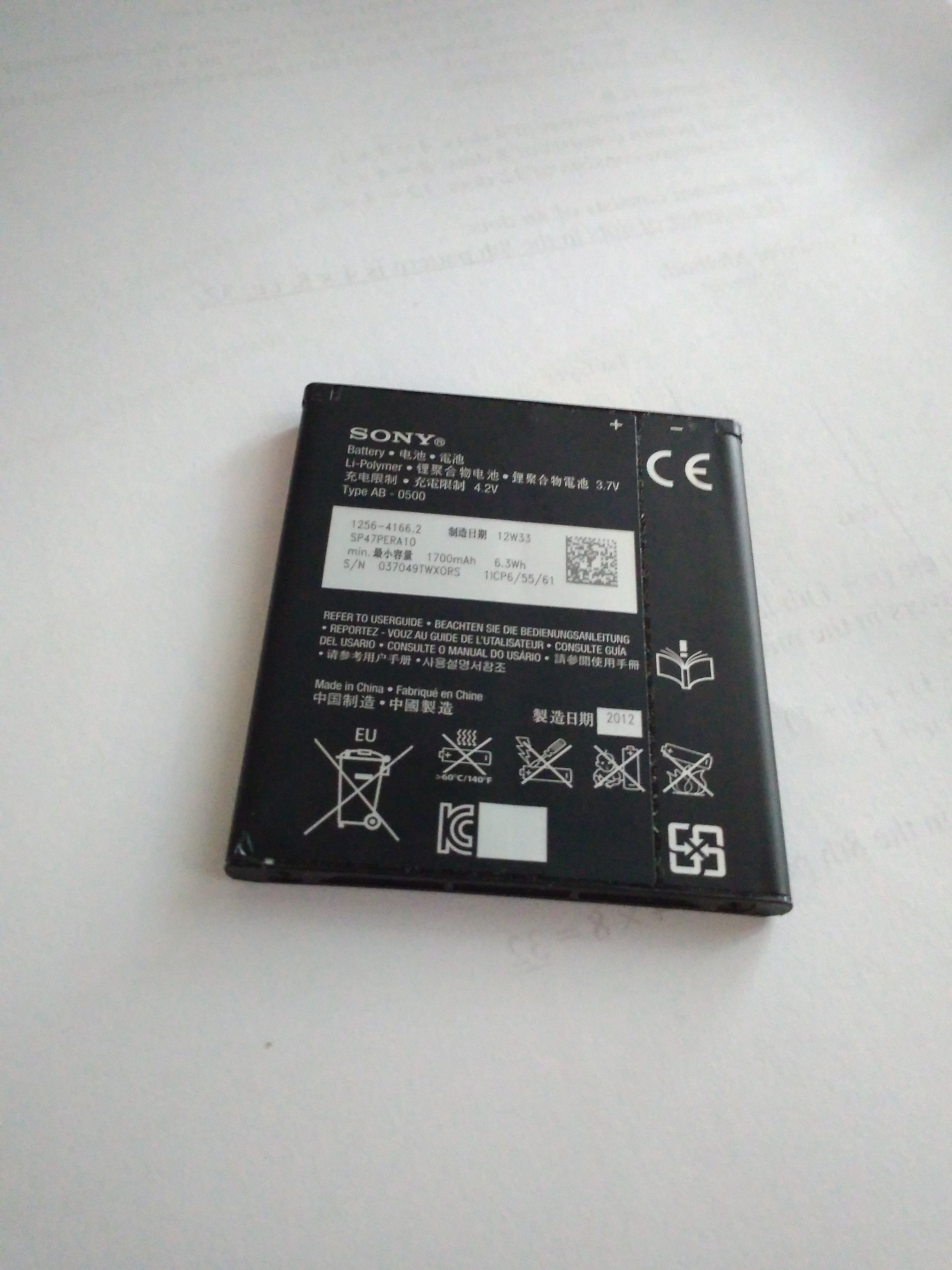 反